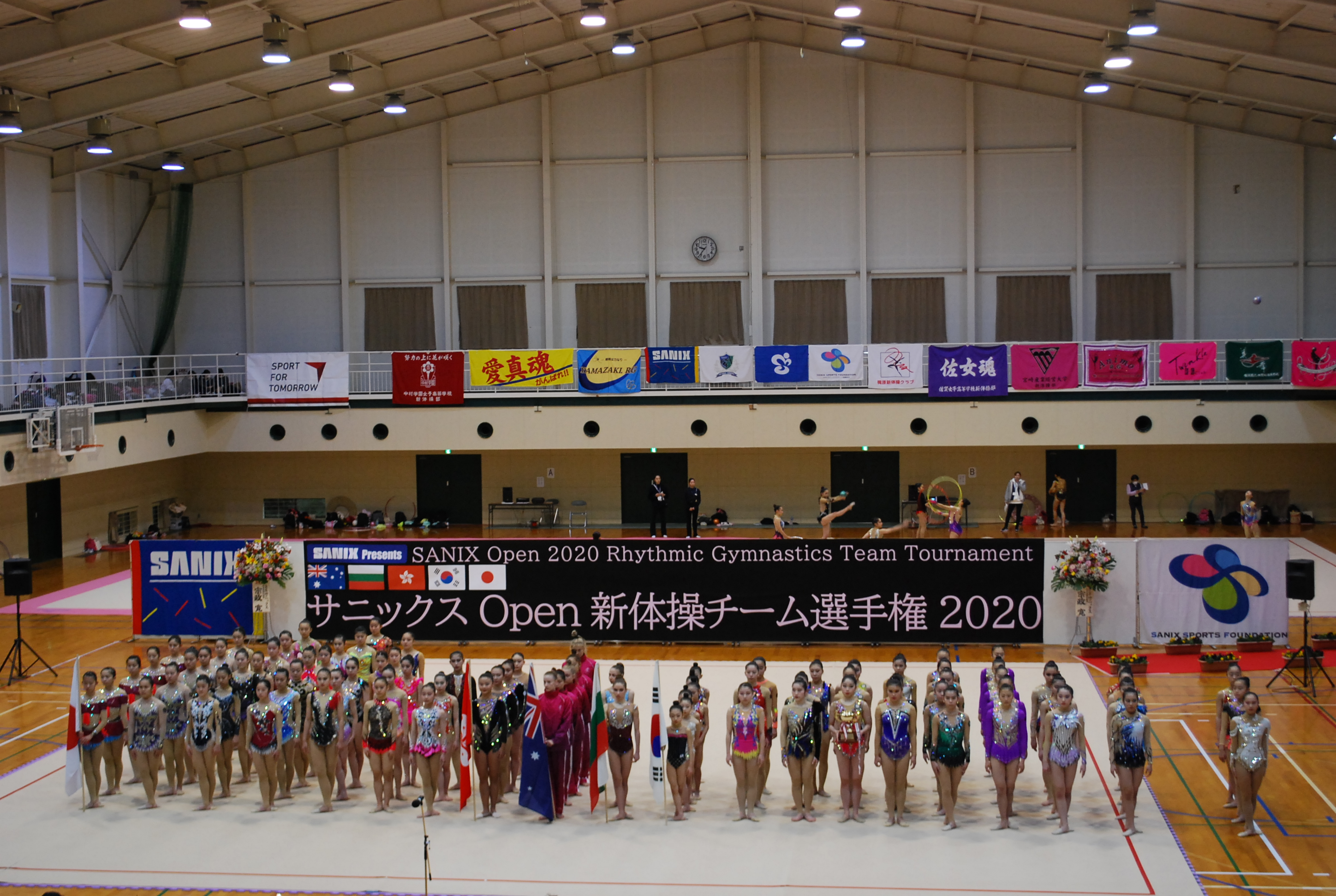 サニックスOpen新体操チーム選手権2020年の開会式の様子です。